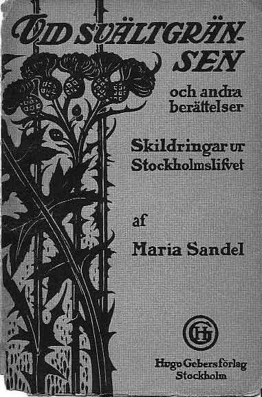 Sandel, Maria: Vid svältgränsen. Book cover